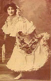 Lola Membrives, actress.